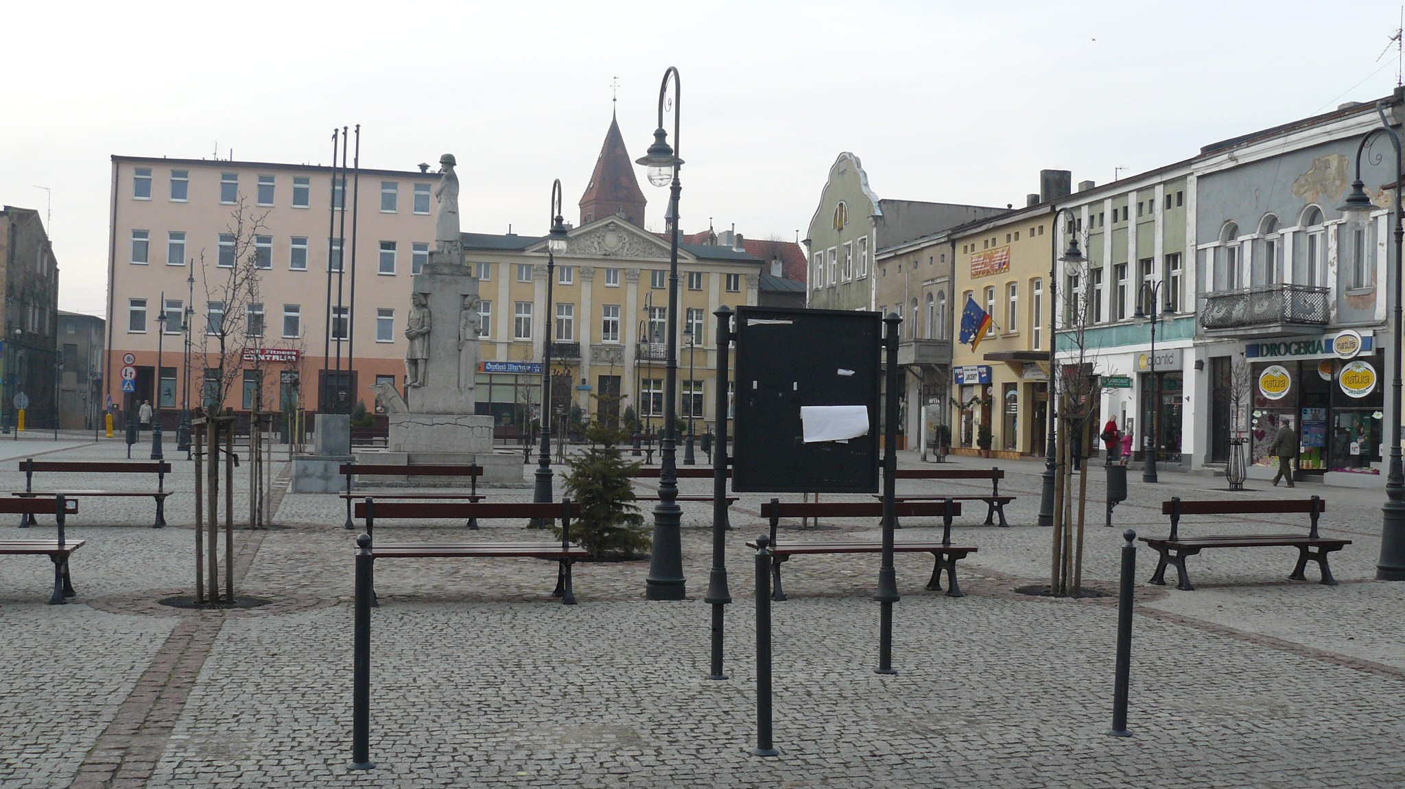 Wąbrzeźno - rynek.